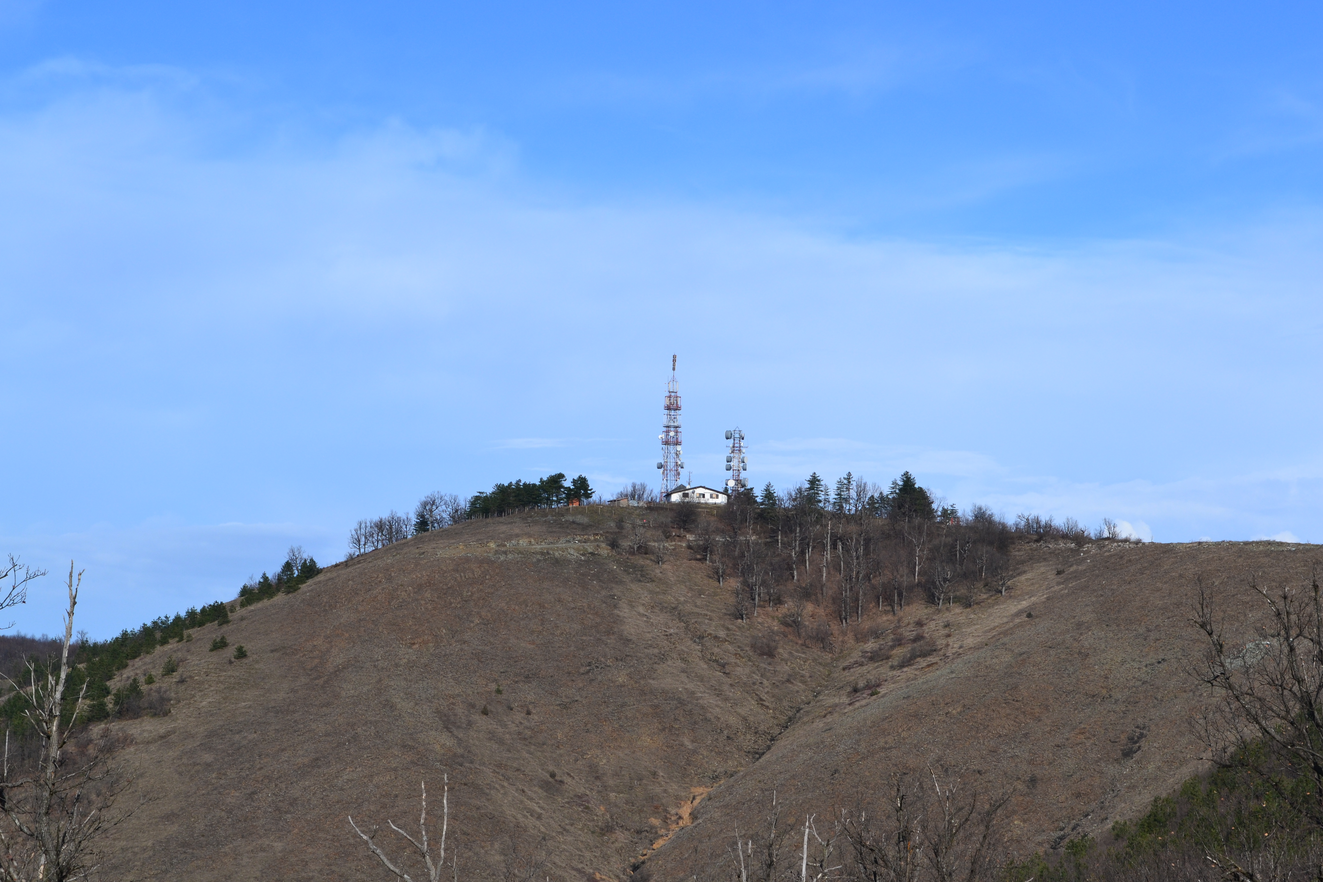 Свињар, врх Љубића